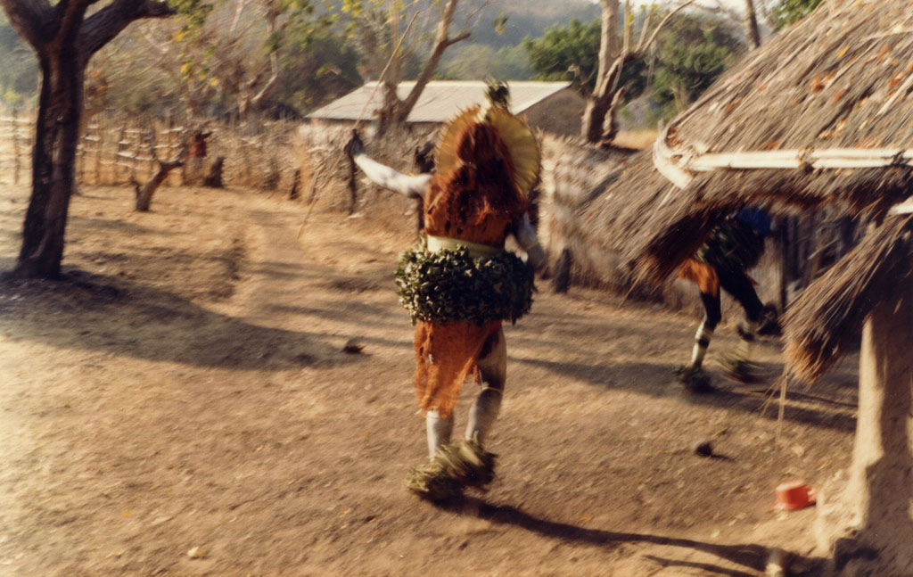 Masked dancers at a girls' initiation ceremony, Bandafassi, southeast Senegal (West Africa) (légèrement retouchée pour les contrastes)